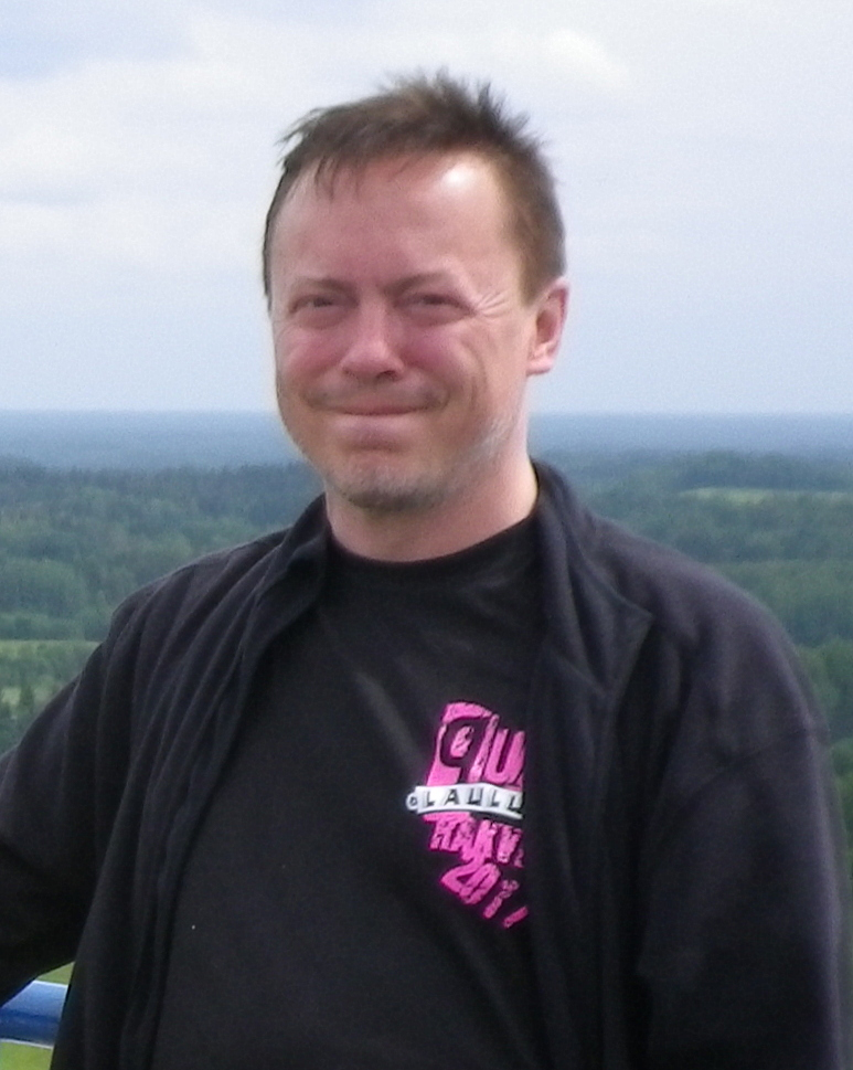 Jaanus Nurmoja